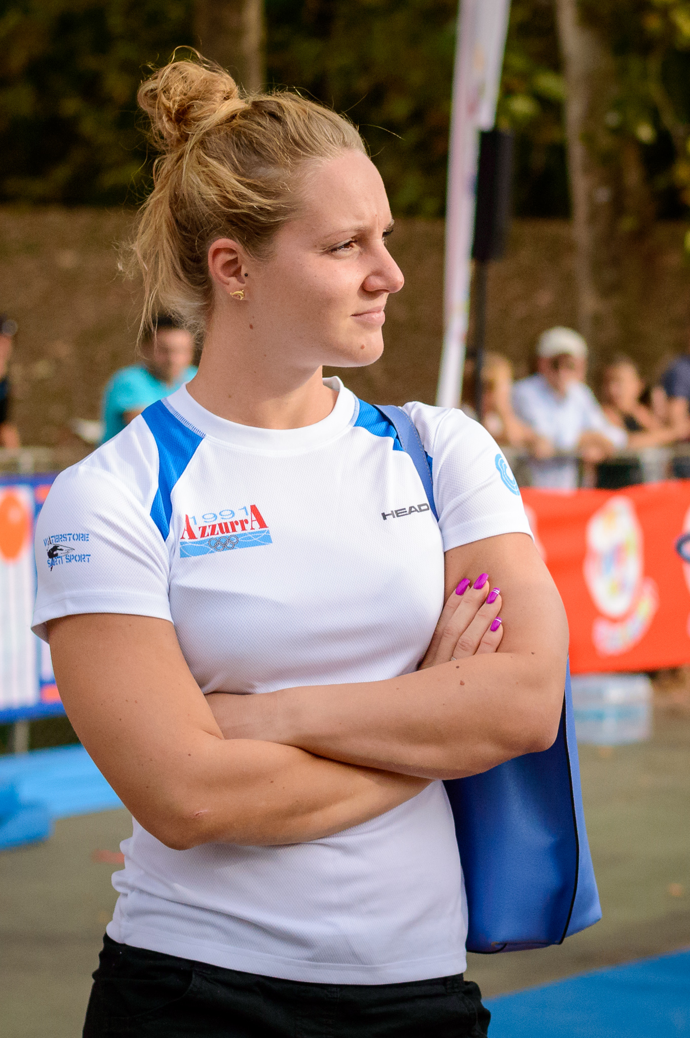 La nuotatrice italiana Ilaria Bianchi